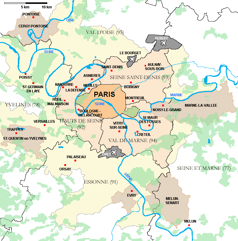 Description : Carte de l'agglomération de Paris Place : Paris, France Date : Septembre 2006 Author : Réalisation Pline